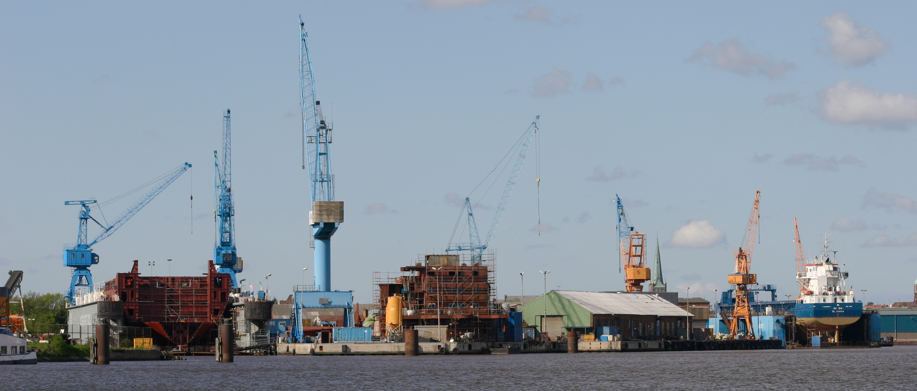 Cassens-Werft in Emden, Ostfriesland, Niedersachsen, von der Hafenseite aus gesehen